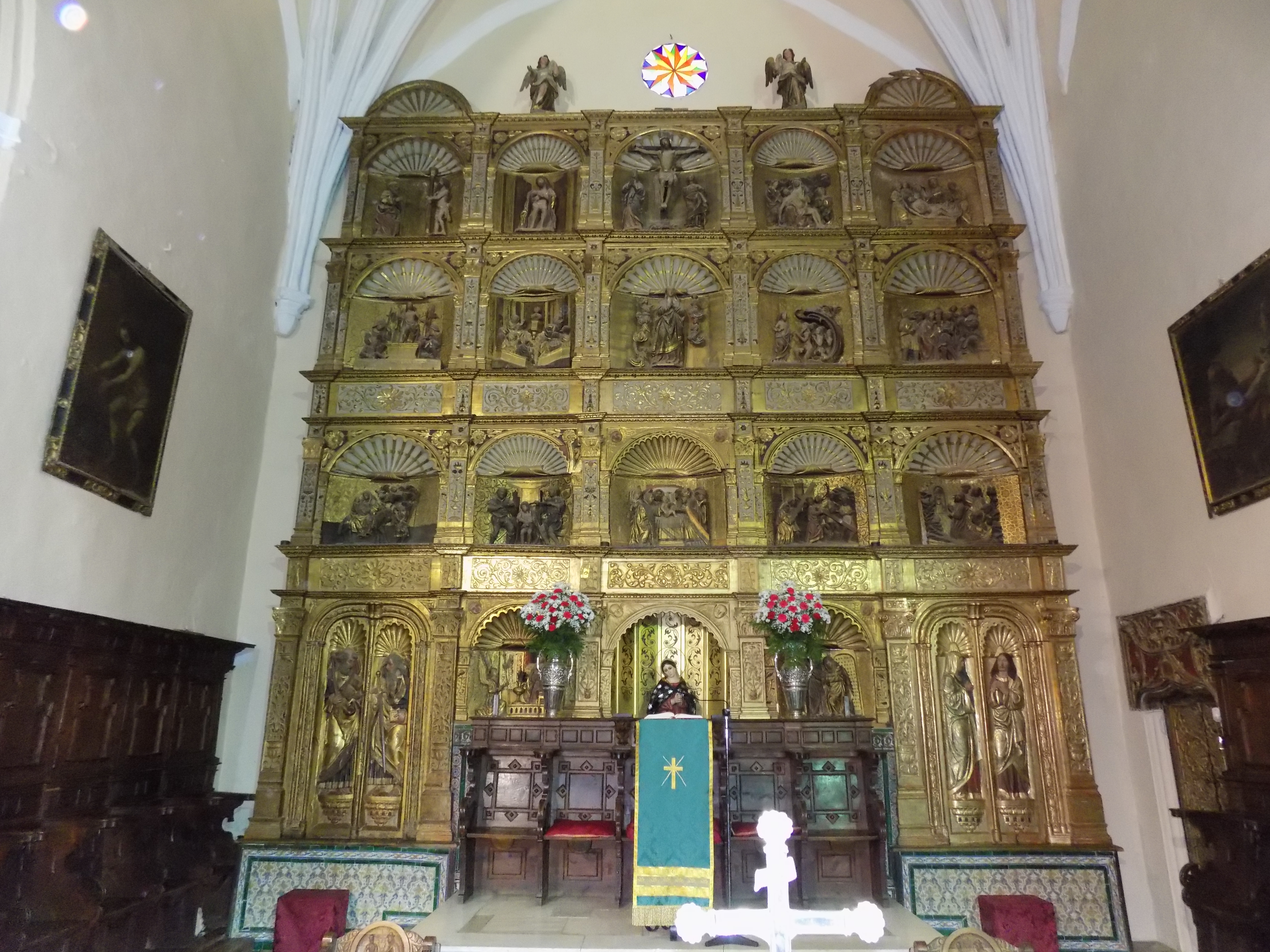 Retablo mayor de la iglesia de Nuestra Señora del Castillo de Fuente Obejuna, provincia de Córdoba, (España).